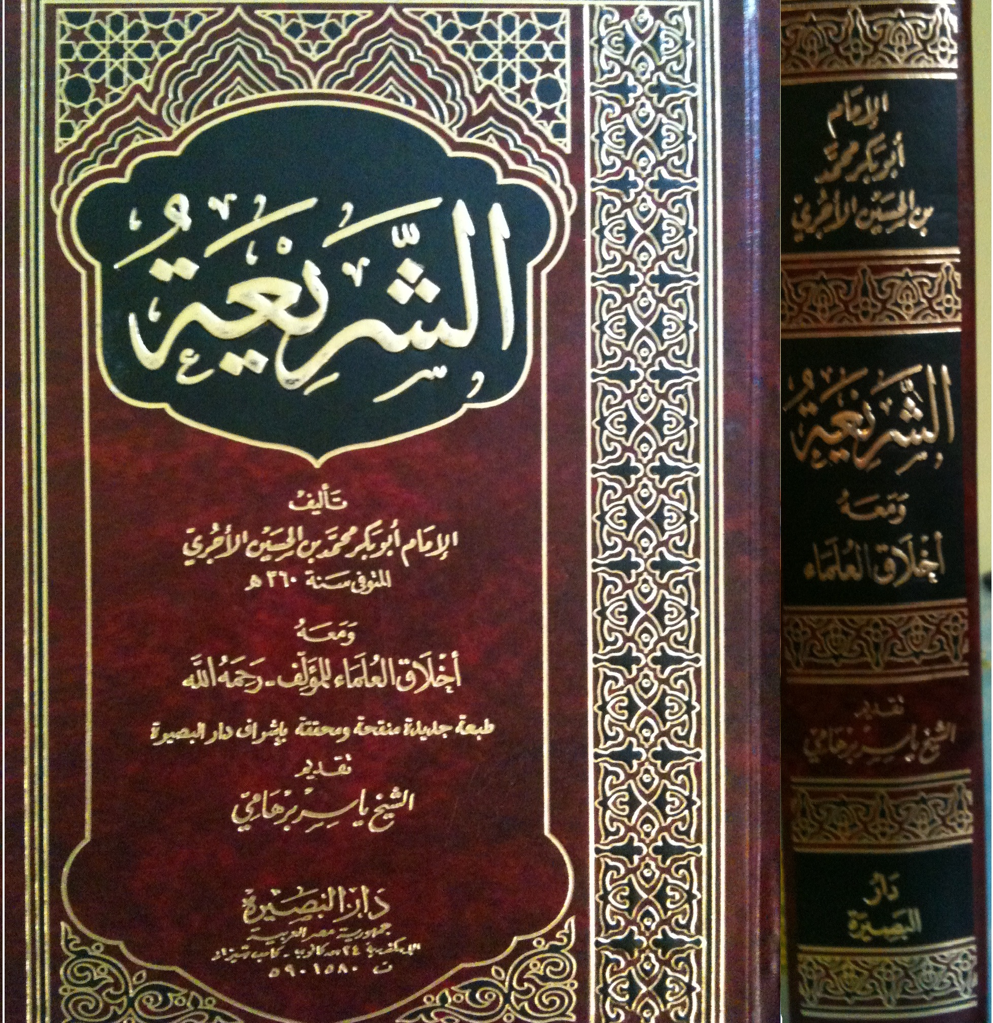 livre kitabe_elcharia